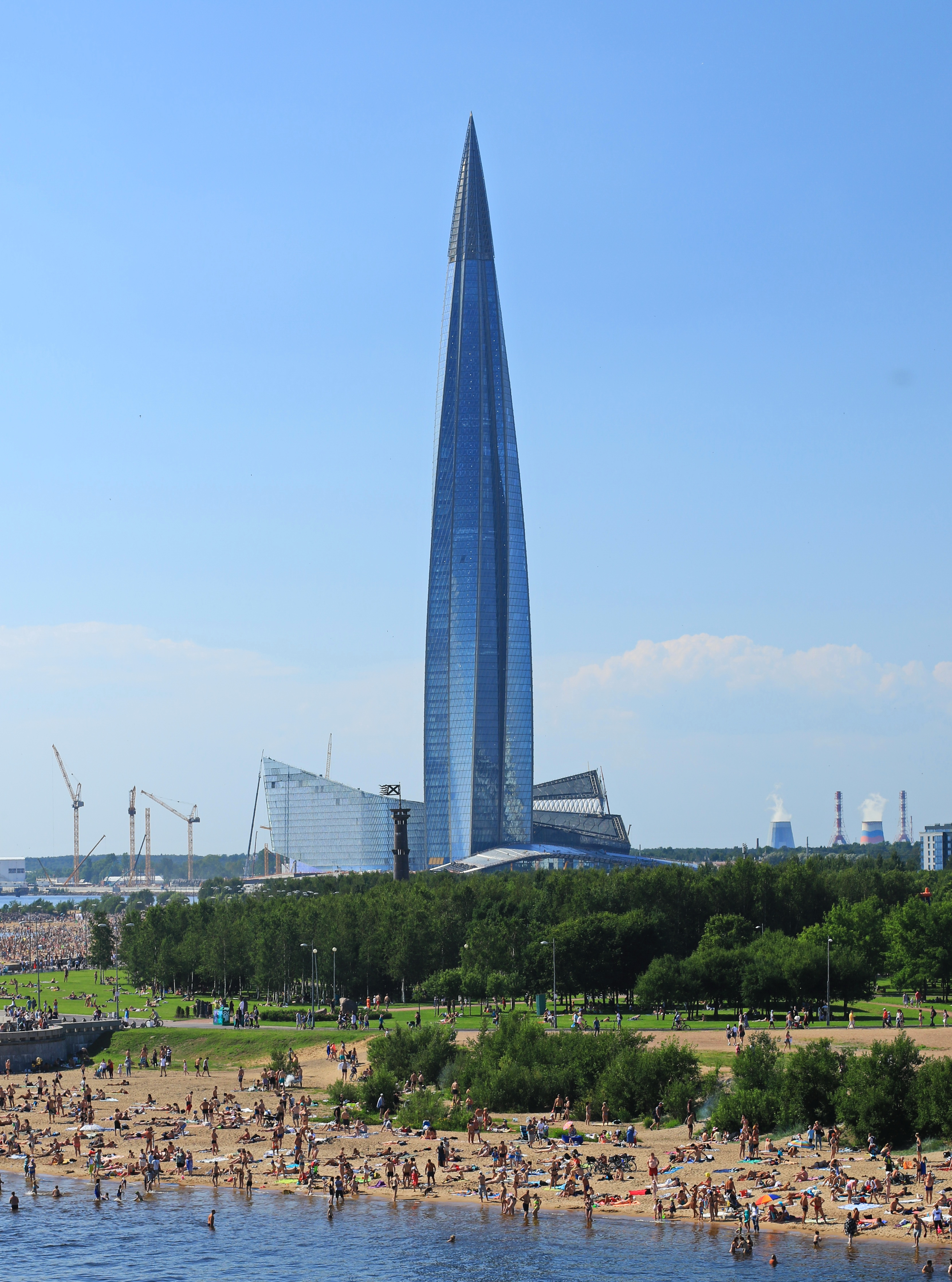 Lachta Zentr in St. Petersburg, Russland. Der Hochbau Lakhta Center ist seit Januar 2018 das höchste Gebäude in Europa (462 m).